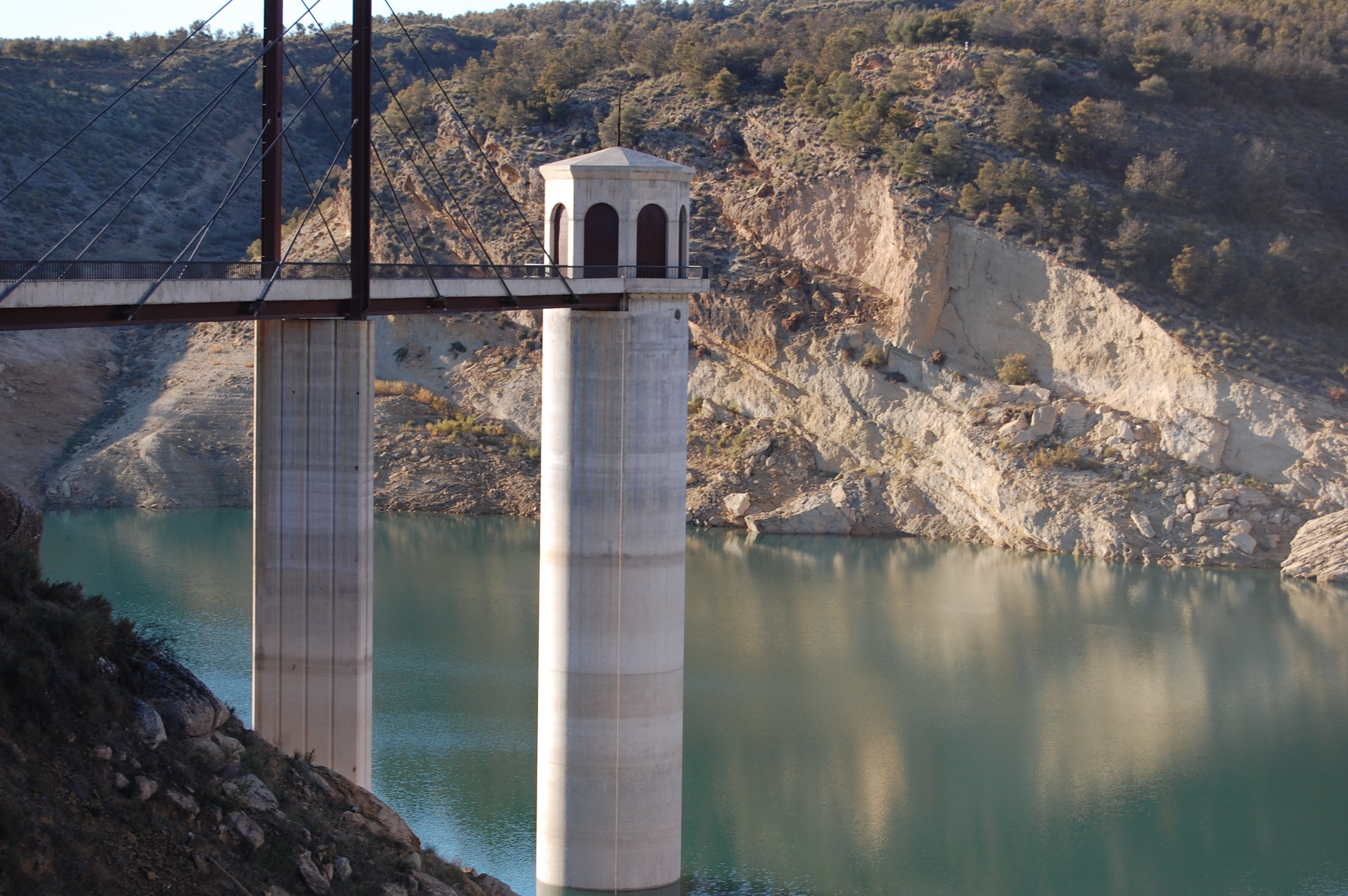 TOMA DE AGUA PANTANO FRANCISCO ABELLAN